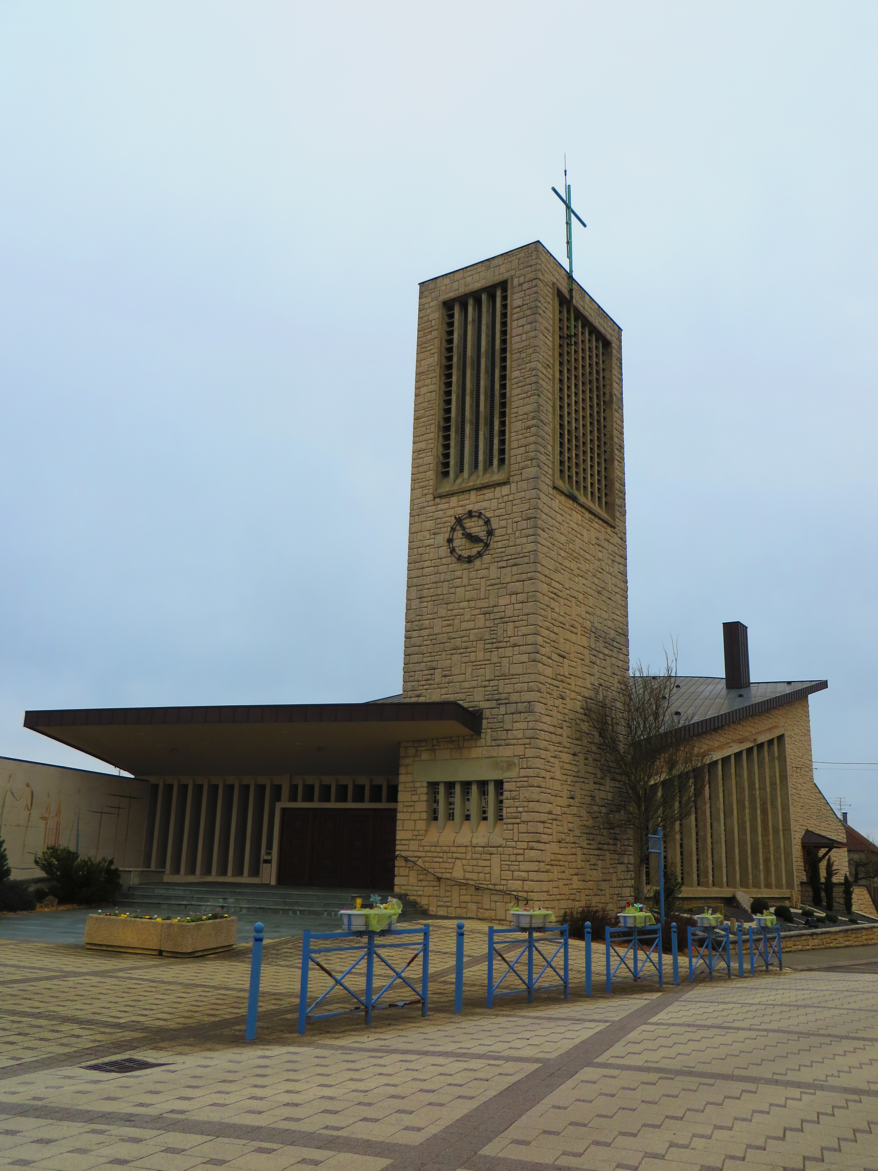 Remering Puttelange eglise